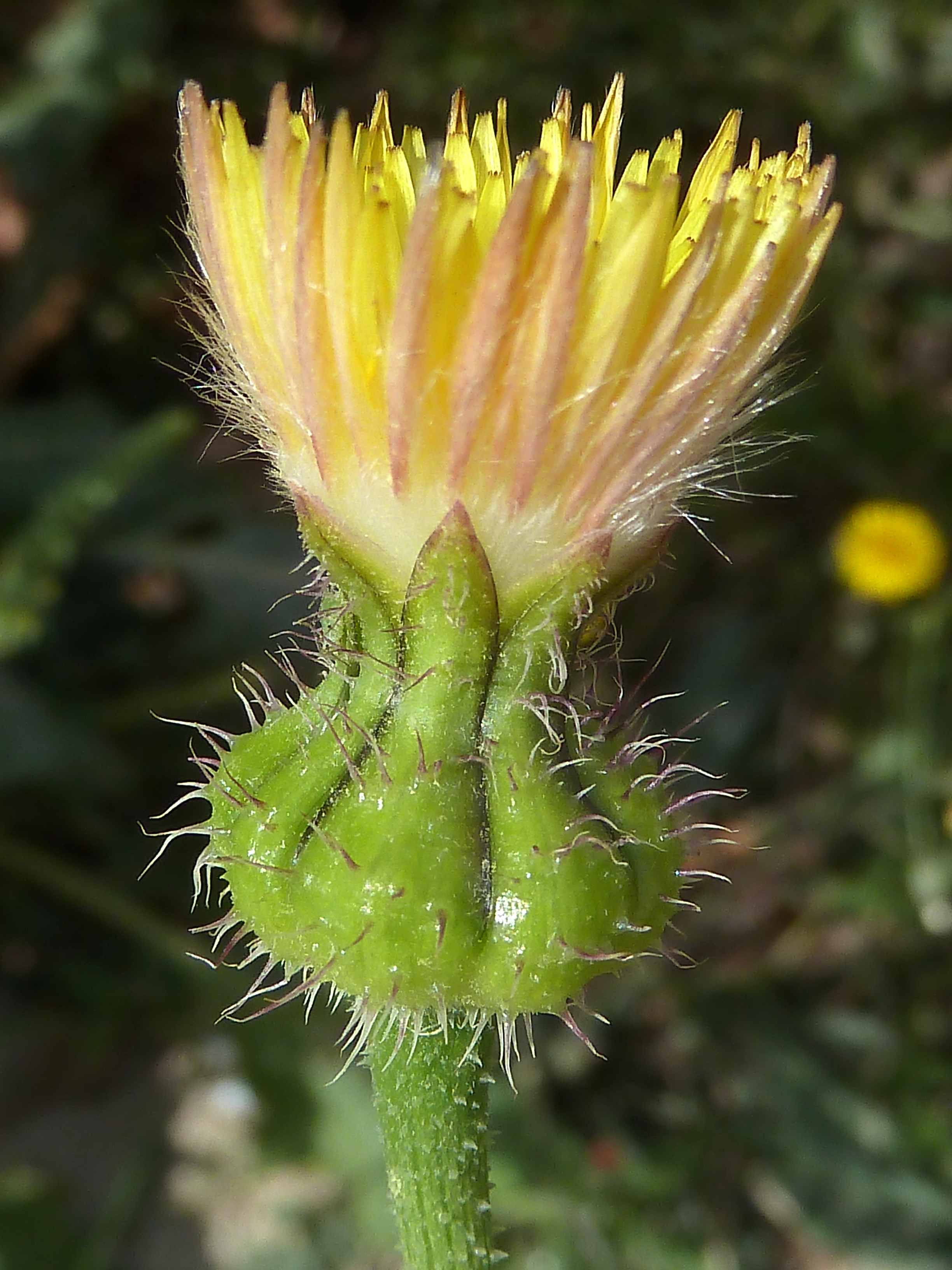 Urospermum picroides - Antesis incipiente. - Descampado urbano, esquina calles San Antonio con Compositor Manuel García Berná, Albatera (Alicante, España).